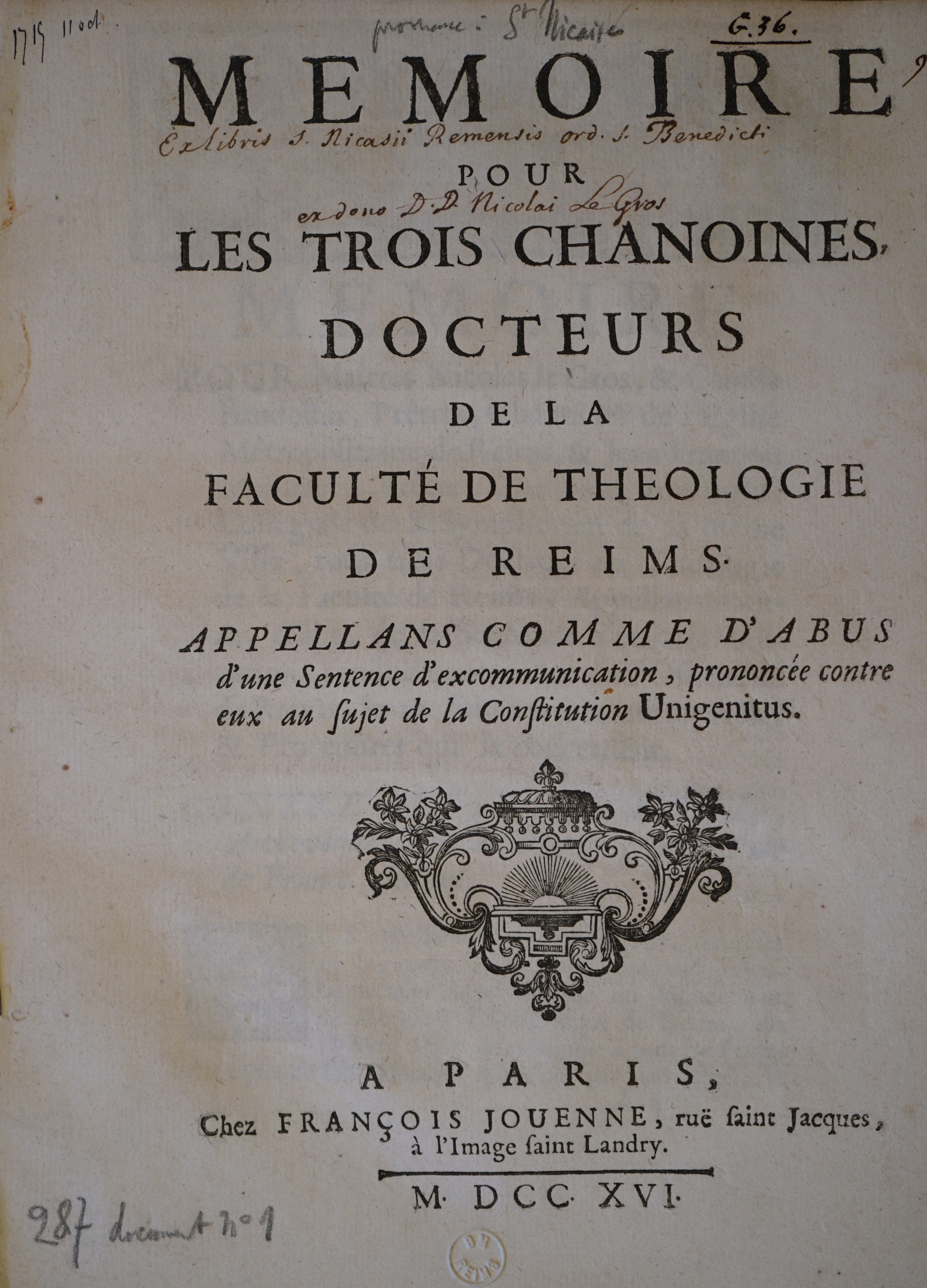 ex-libris extrait d'un livre de la bibliothèque de st-Nicaise.